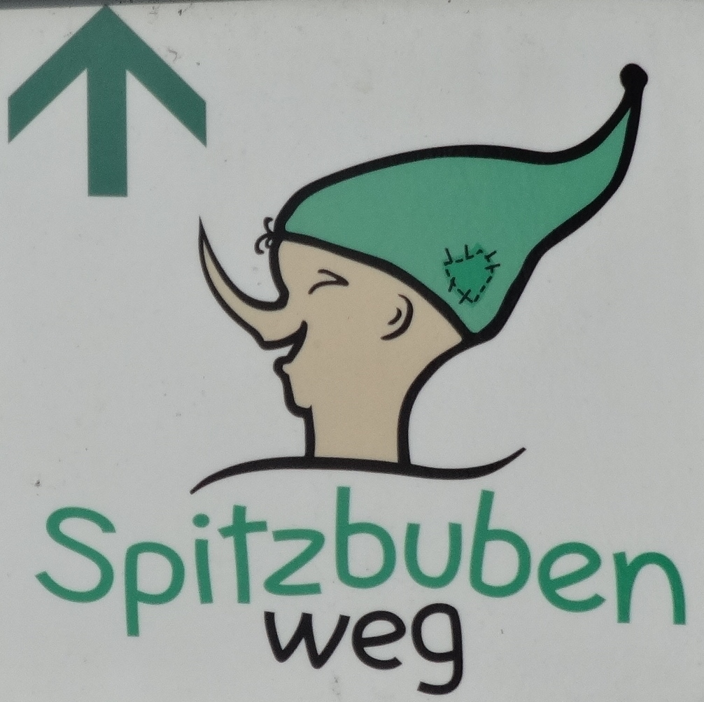 Der Spitzbubenweg ist ein rund 10 Kilometer langer Wanderweg in Jüterbog. Er führt um die historische, unter Denkmalschutz stehende Altstadt.